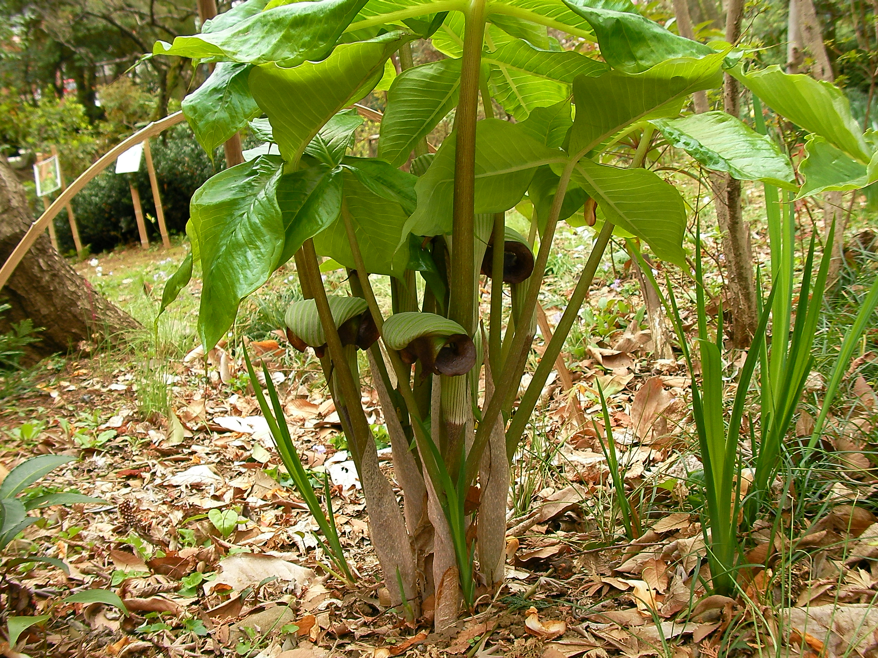 ムサシアブミ[武蔵鐙][Arisaema ringens (Thunb.) Schott]-花